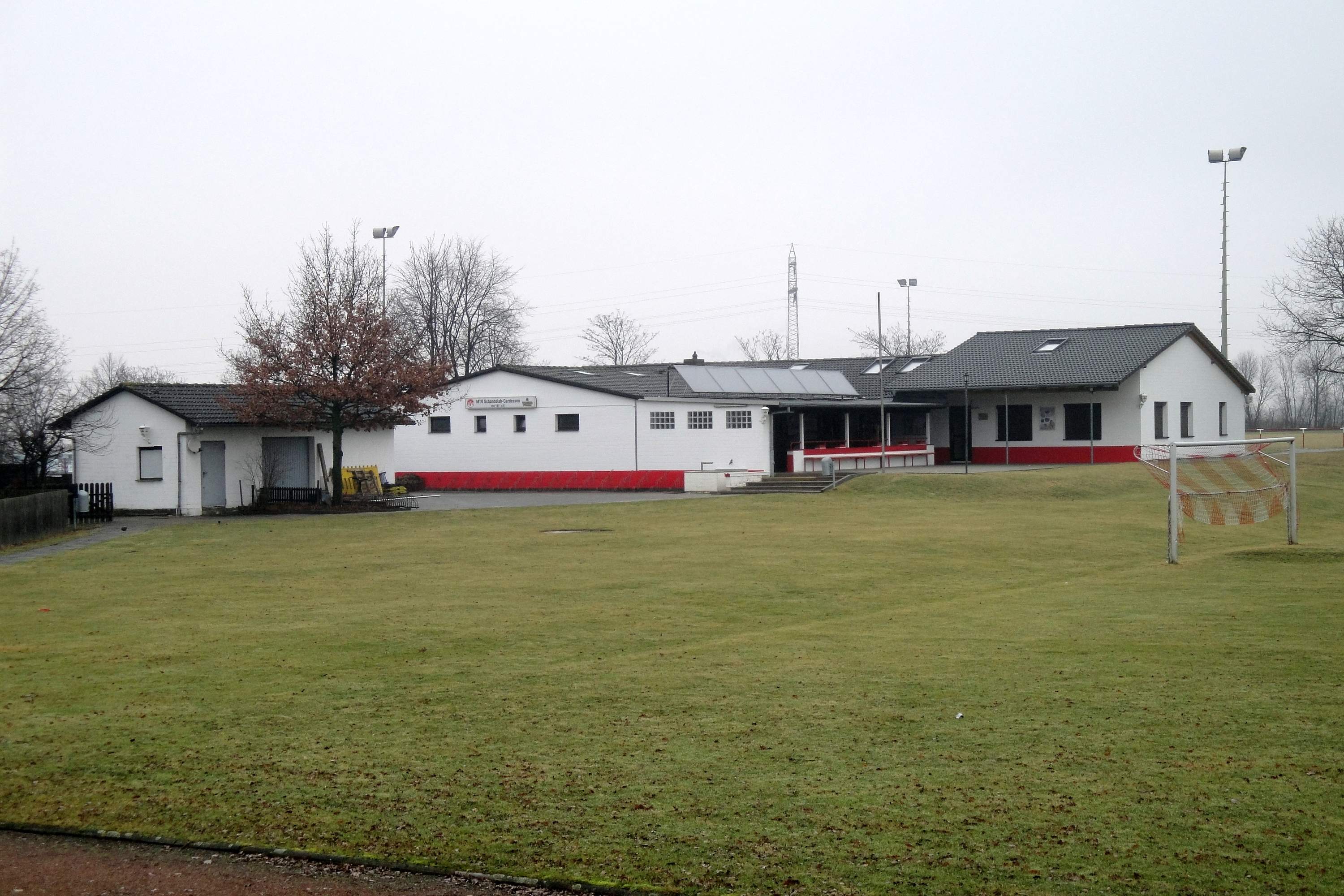 Sportheim Schandelah (Männerturnverein (MTV) Schandelah-Gardessen)